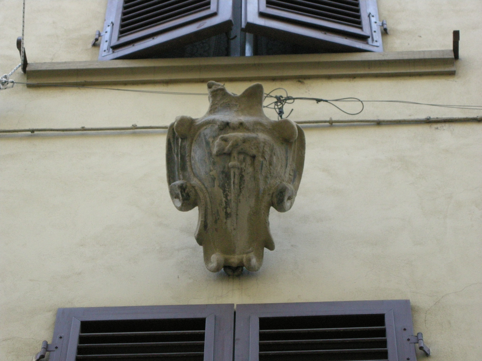 Via del sole, stemma dei vallombrosani